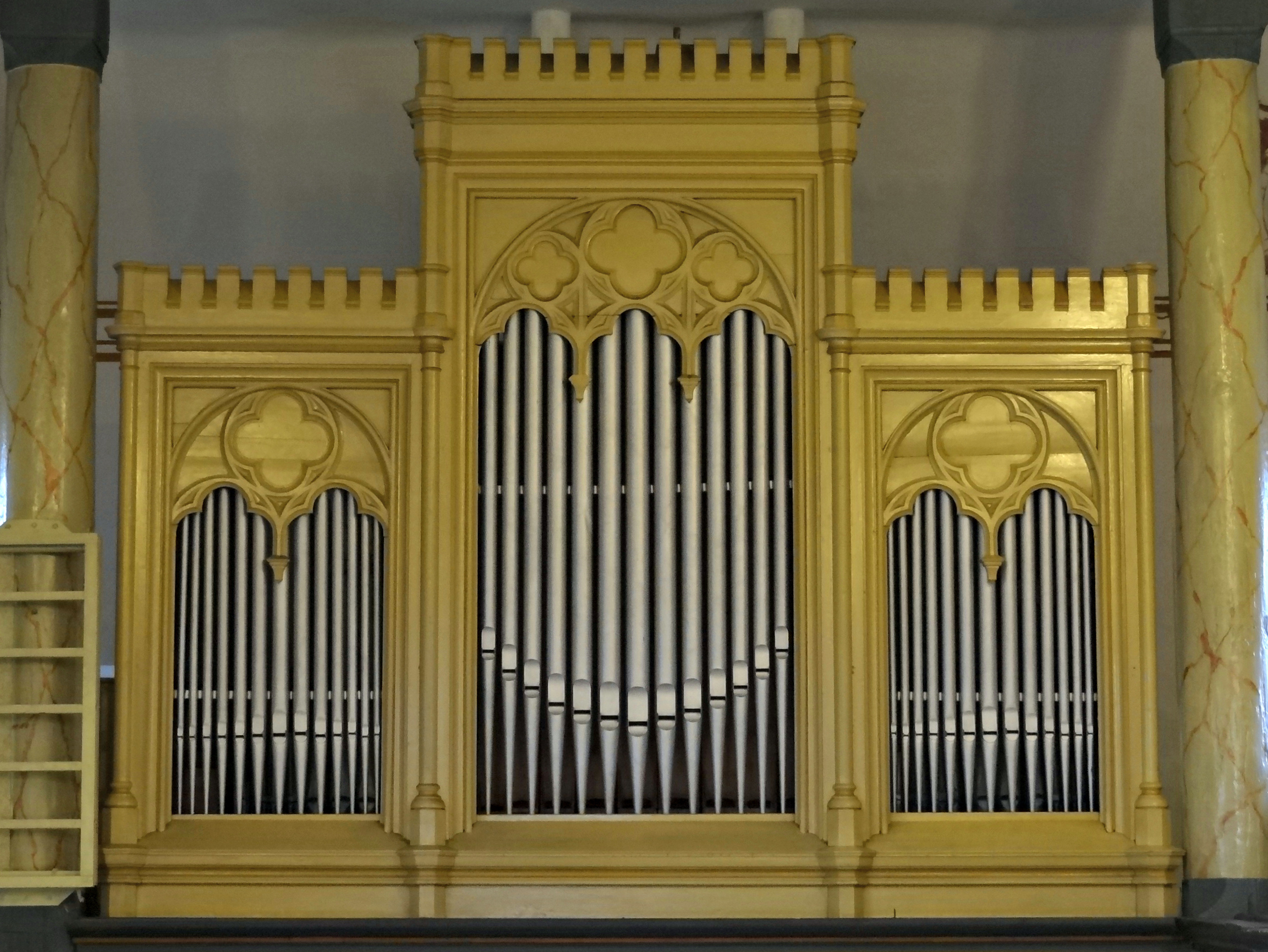 Evangelische Kirche Albach